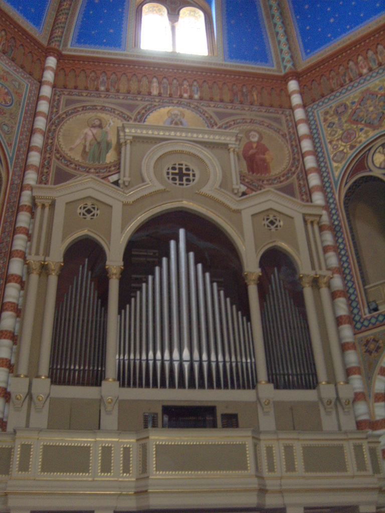 Soncino, Mantova.